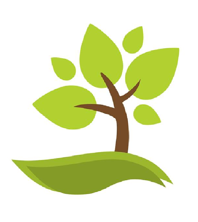 Escudo